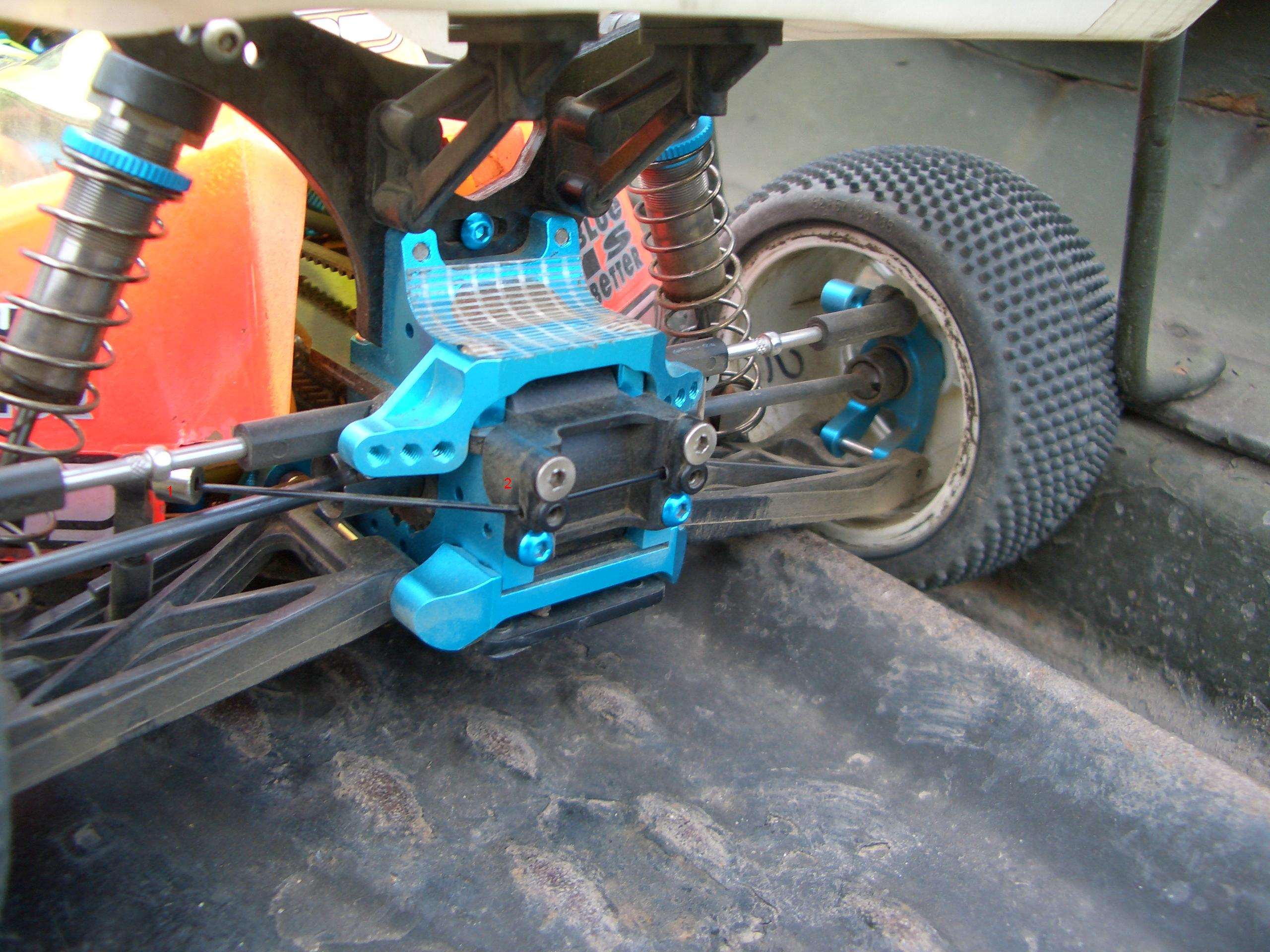 Задний стабилизатор поперечной устойчивости на автомодели (багги Tamiya TRF 501X). Видно, что торсион соединен как с подвеской (1), так и корпусом (2). Таким образом, в повороте, к примеру, в правом, кузов начнет крениться влево, но торсион будет этому препятствовать, перенося нагрузку на левое колесо